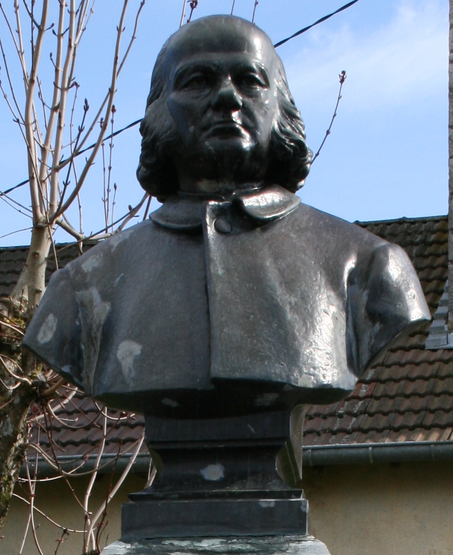 Détail de la statue d'Alphonse Voisin-Delacroix à Alaise (Doubs).